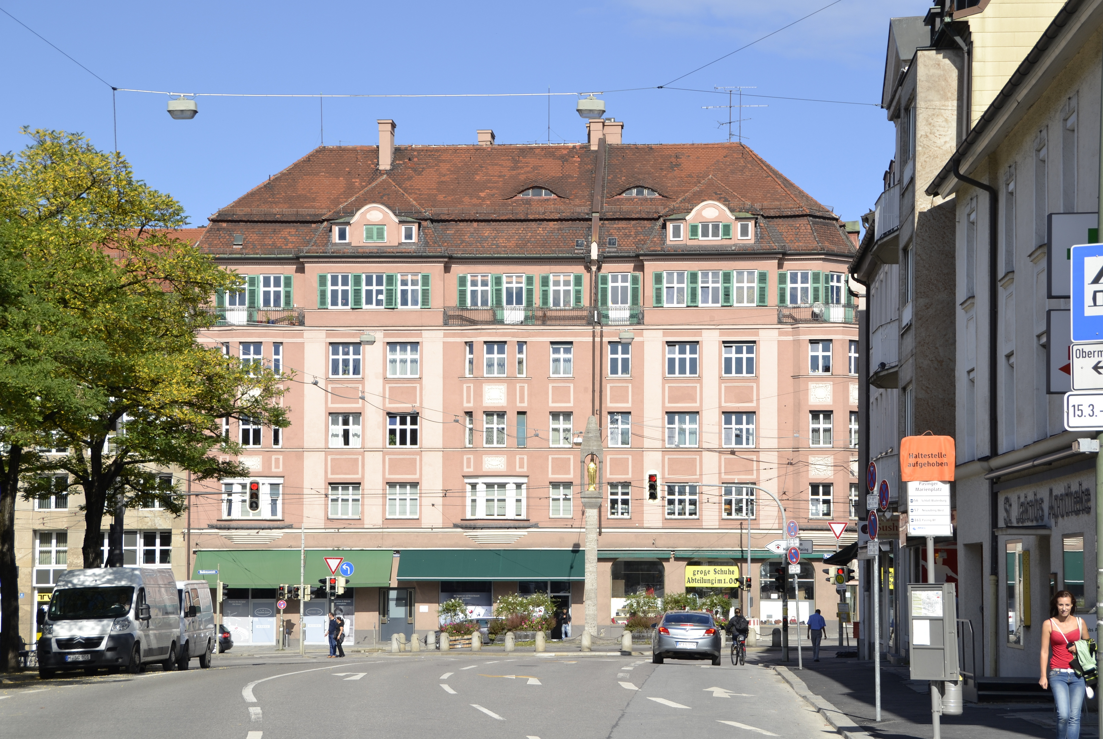 Bodenseestraße - Geschäftshaus in Pasing.